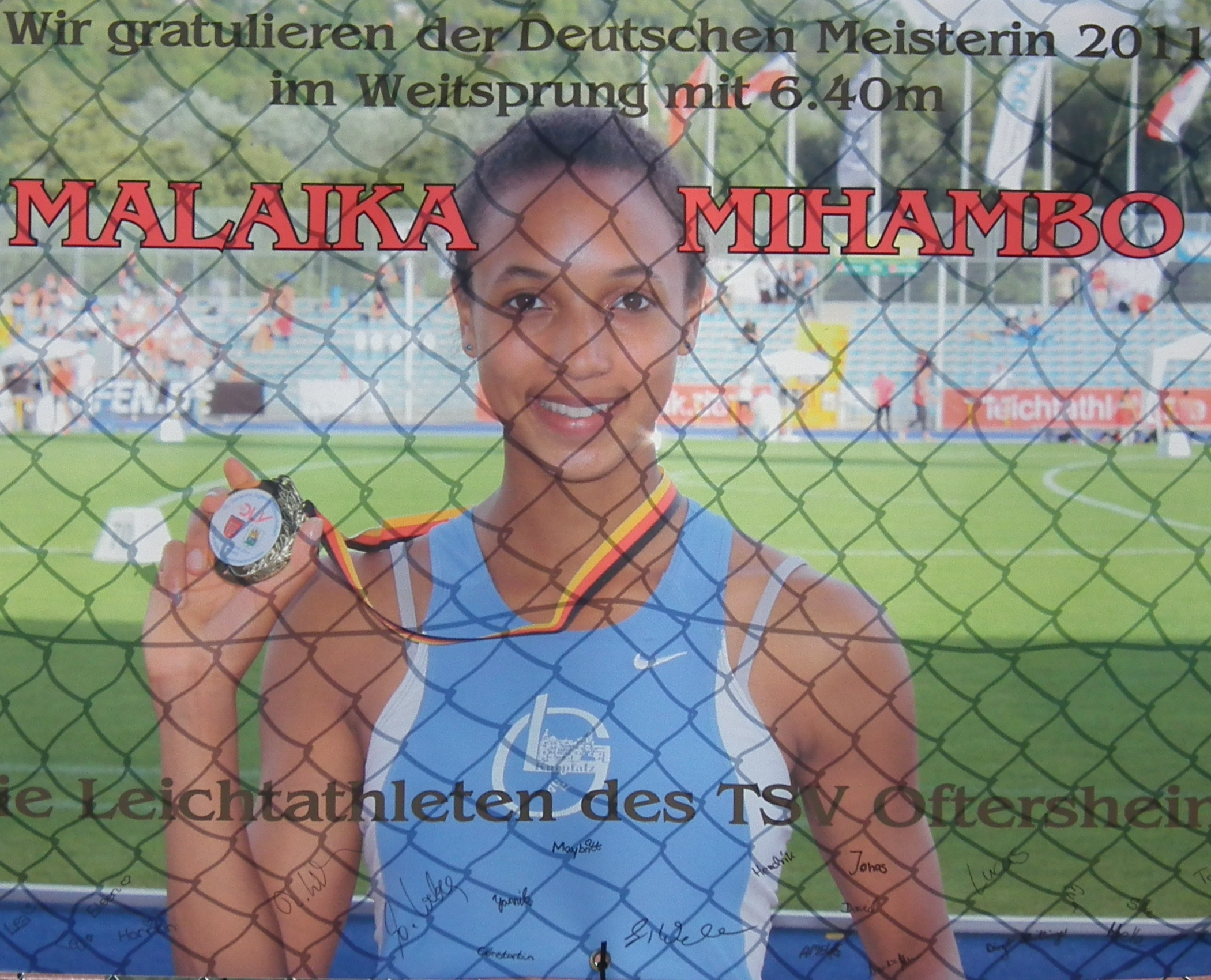 Gratulation des TSV Oftersheim an Malaika Mihambo (Baden-Württemberg, Deutschland)